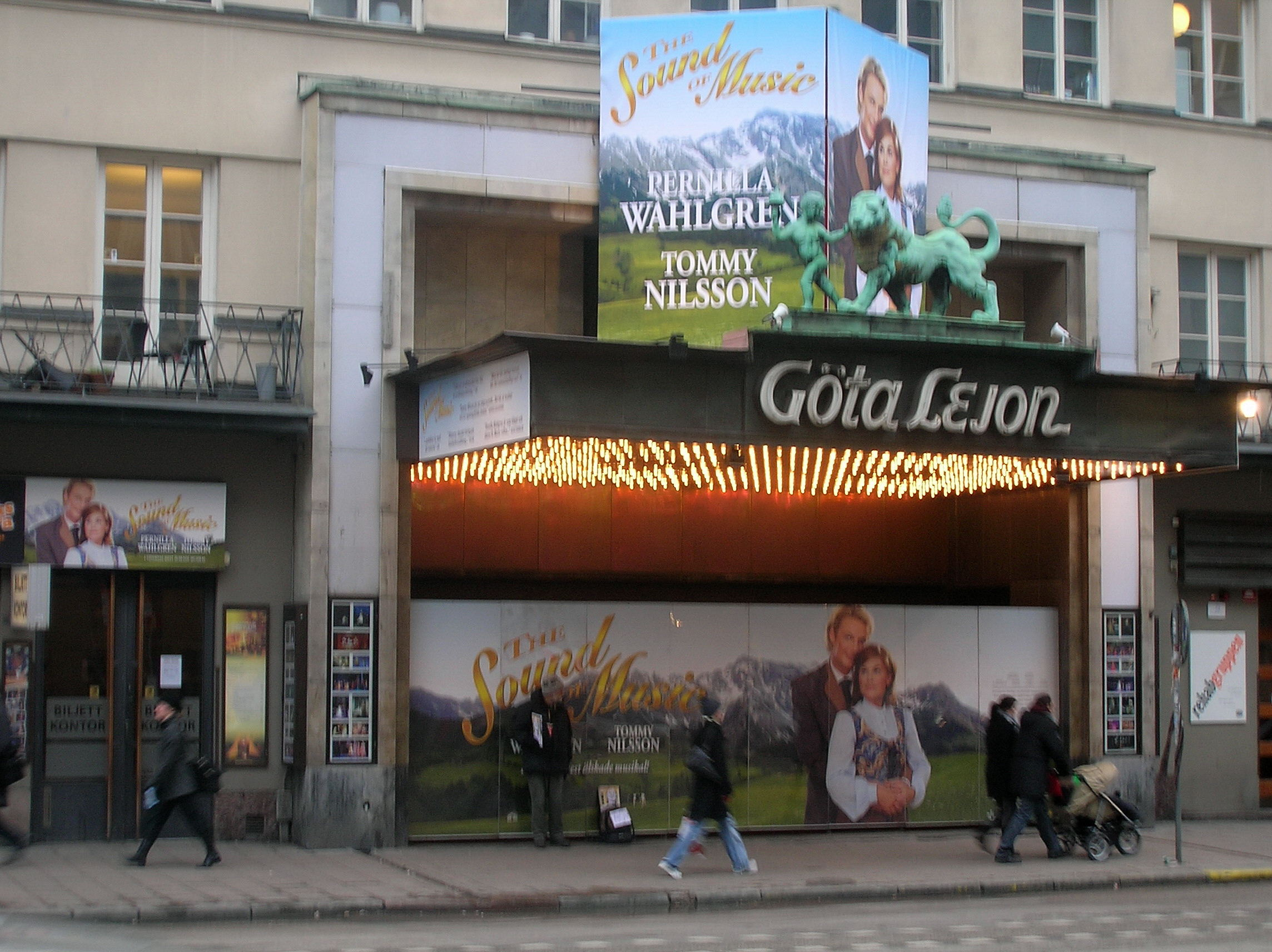 Theatre Göta Lejon at Götgatan, Stockholm